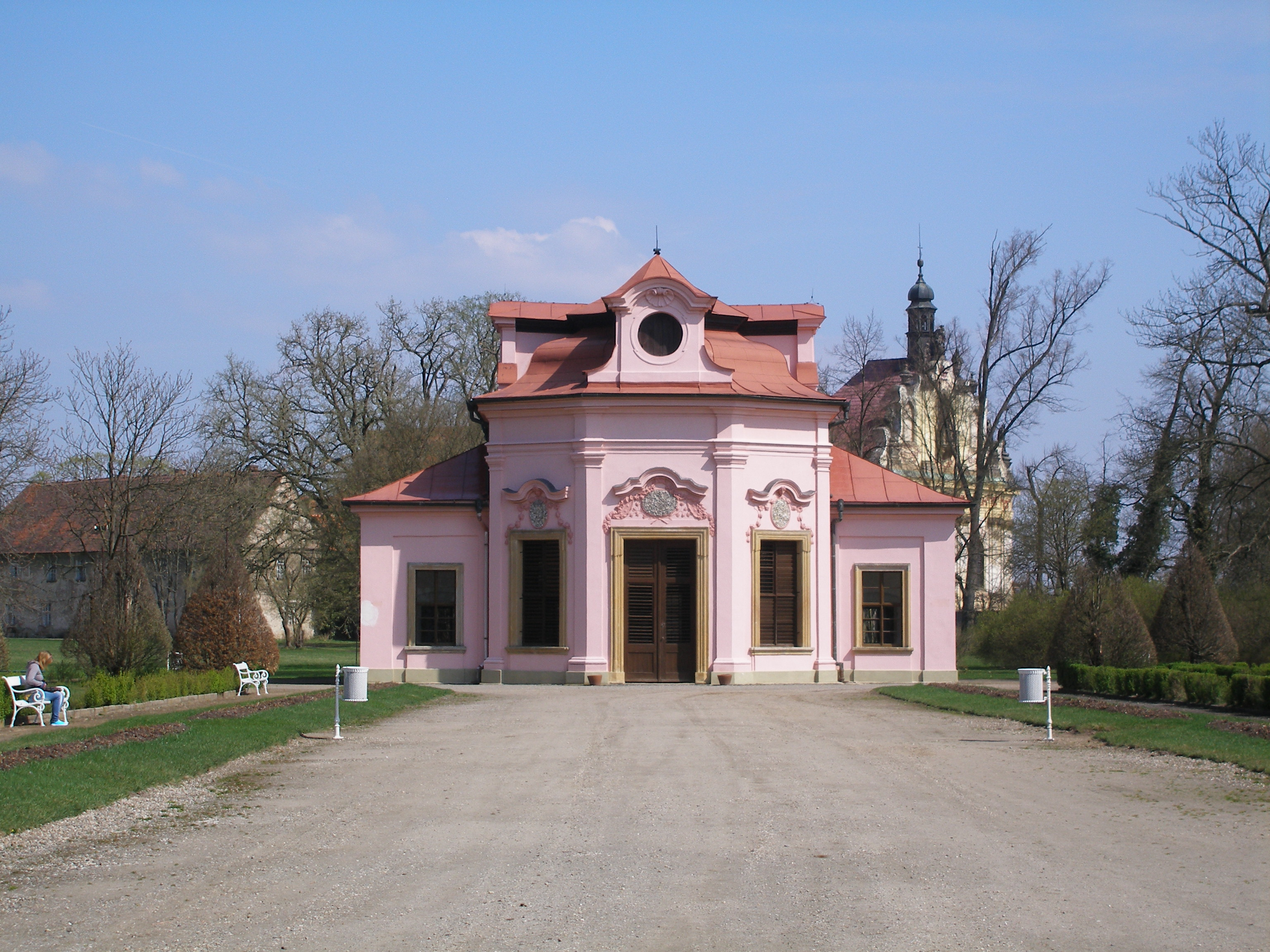 Sala terrena zámku Mnichovo Hradiště.